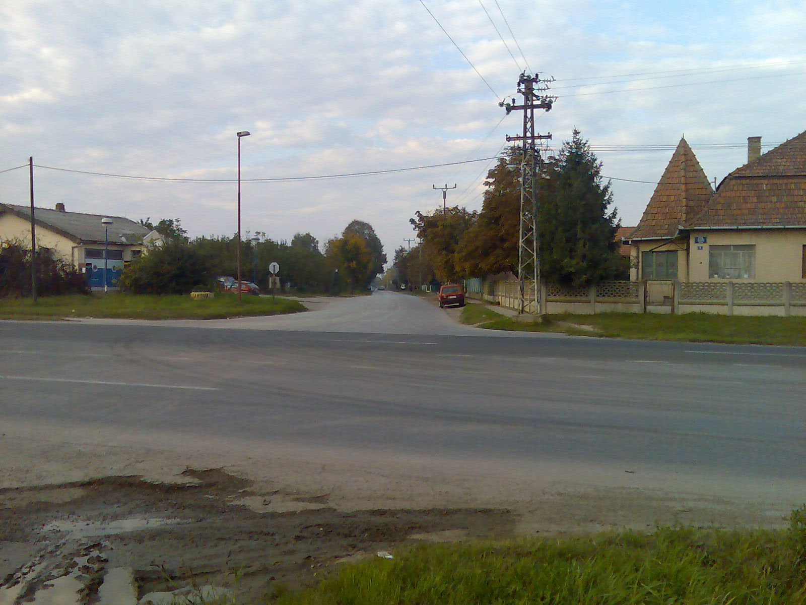 Улаз у насеље Радановац